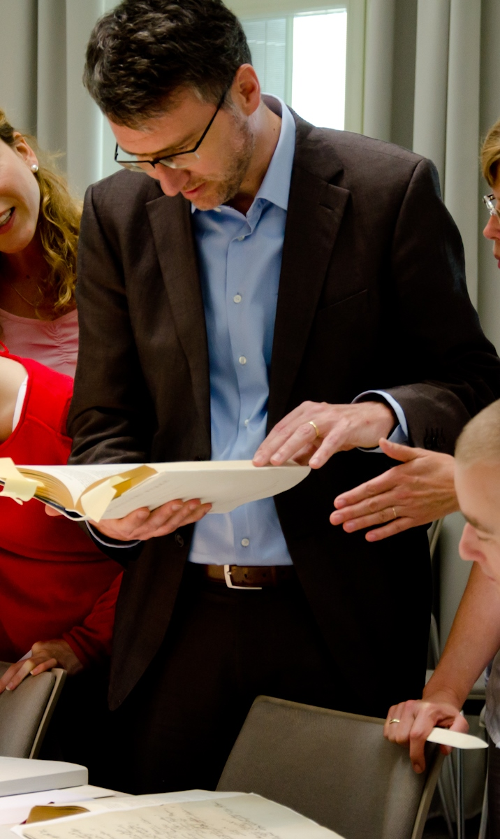 Jörg Robert (Goethe-und Schiller-Archiv Weimar 2013)